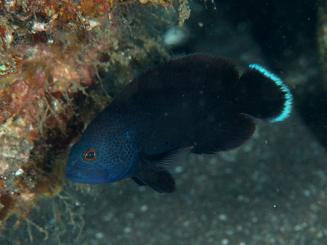 アザハタyg Cephalopholis sonnerati